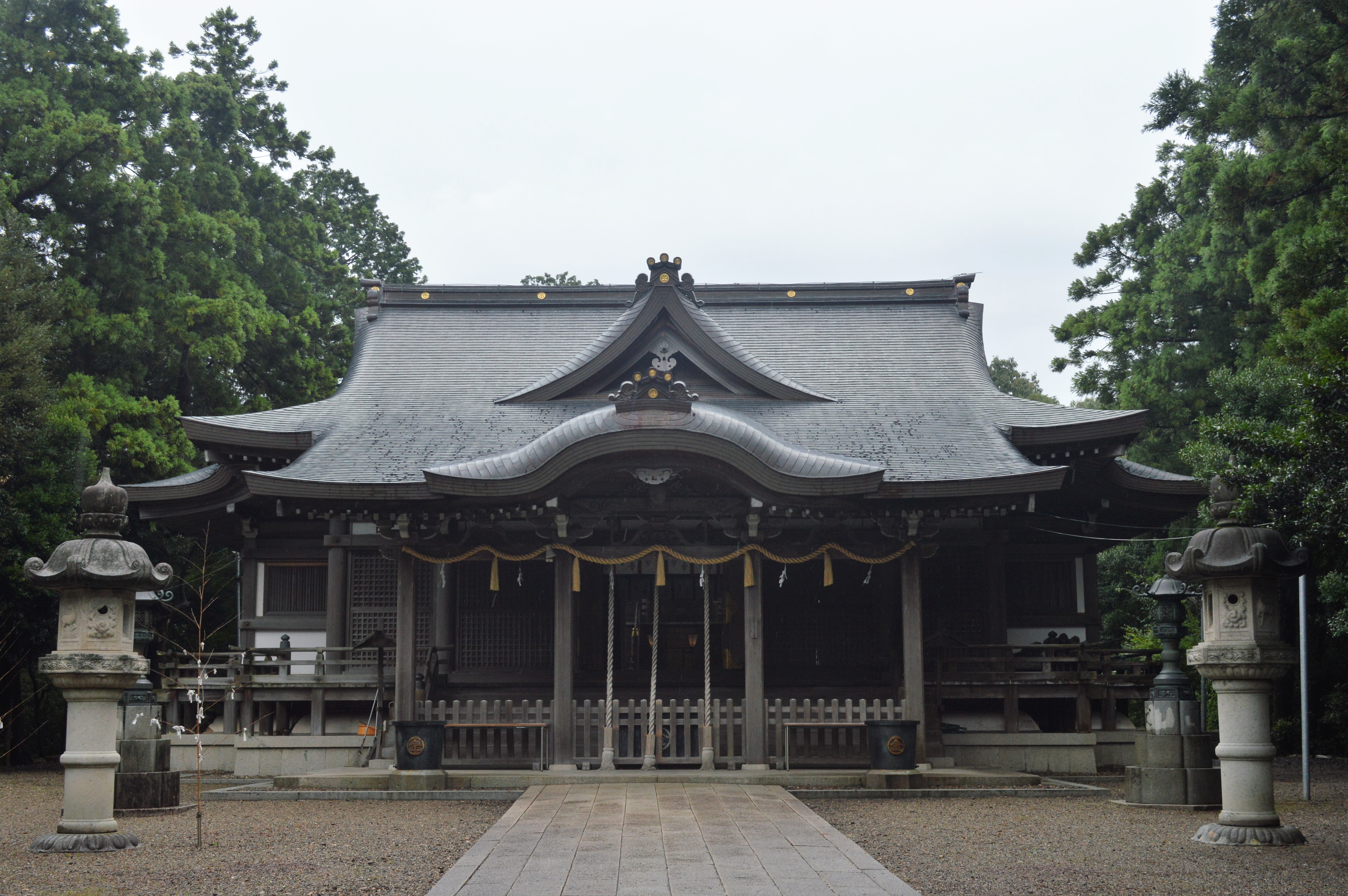 京都府京丹後市の金刀比羅神社。